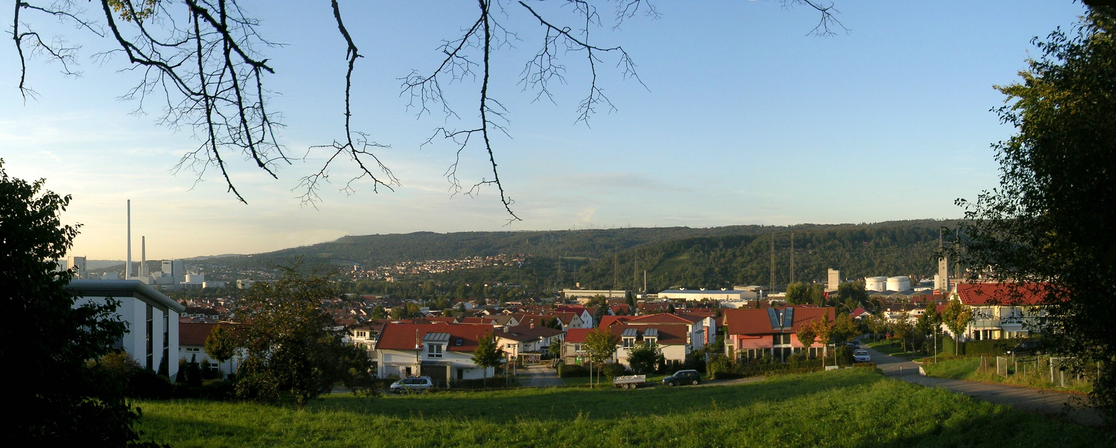 Ausblick von der Kaiserlinde auf Deizisau und das Neckartal